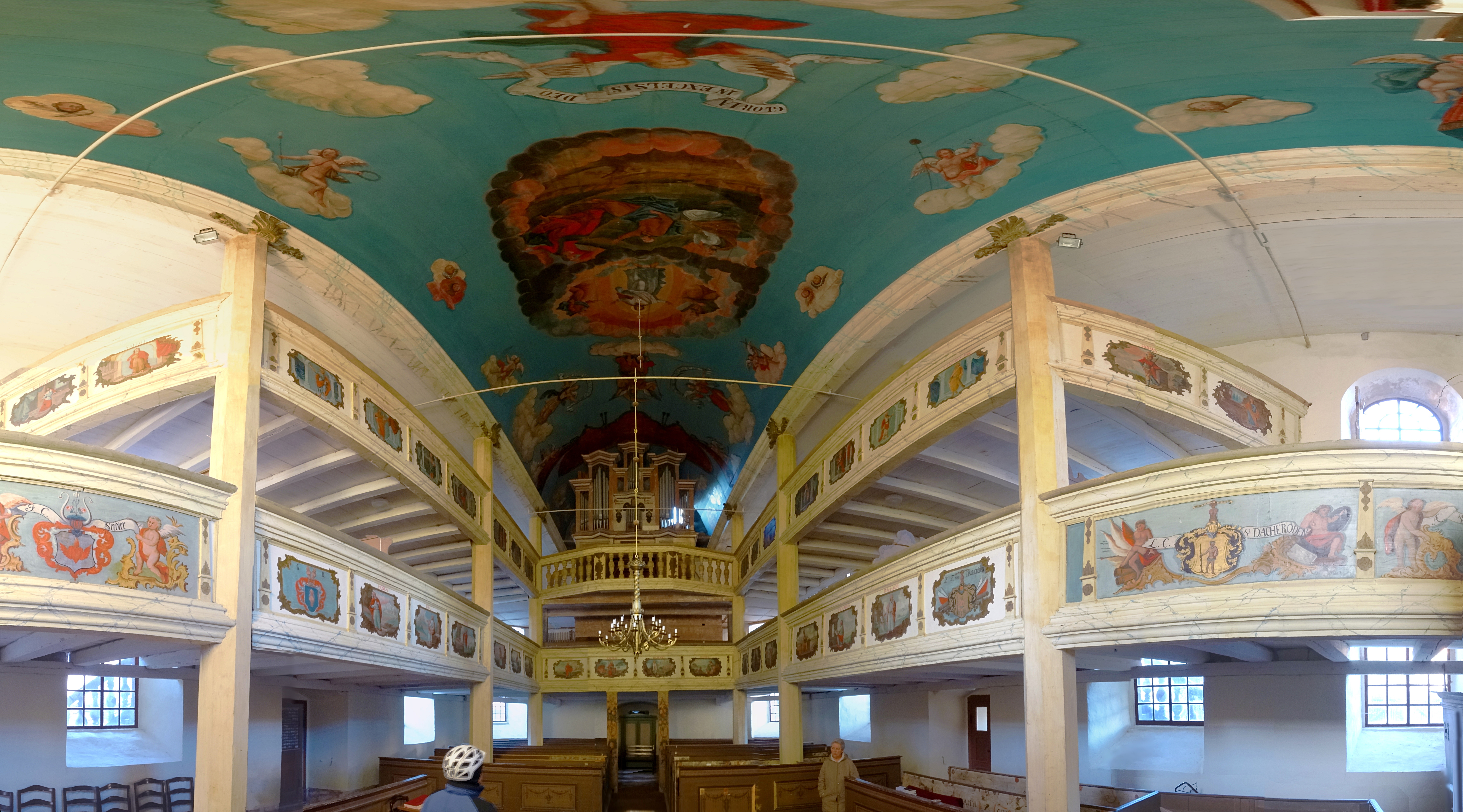 Innenraumpanorama St. Martinus (Westgreußen). Die von Außen zugänglichen Emporen tragen Felder mit den Familienwappen der Gutsbesitzer ( von Selmnitz bis von Dacheröden).